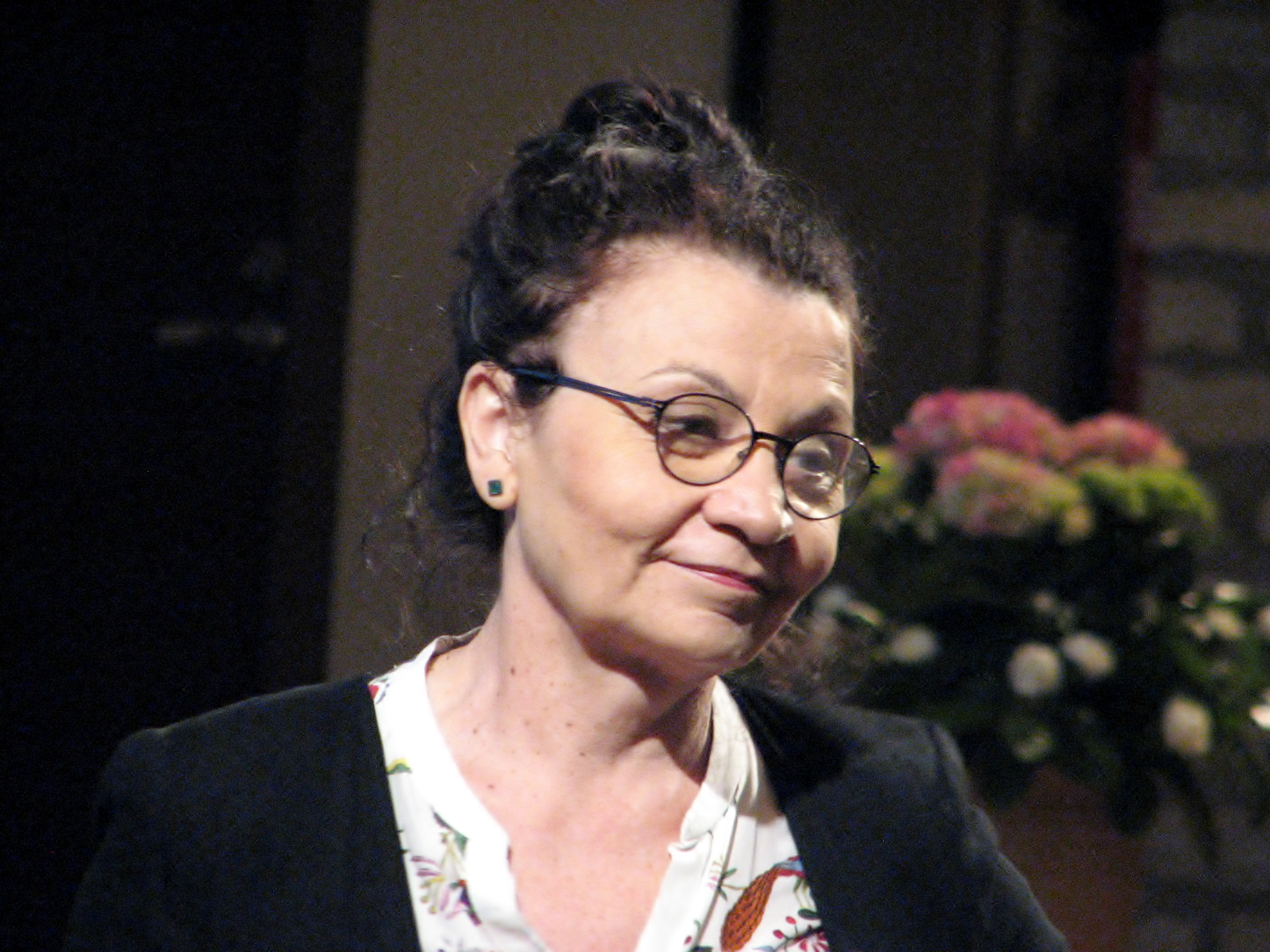 Regina Lukk-Toompere konkursi 25 kauneimat Eesti raamatut ja 5 kauneimat lasteraamatut 2013 autasustamisel